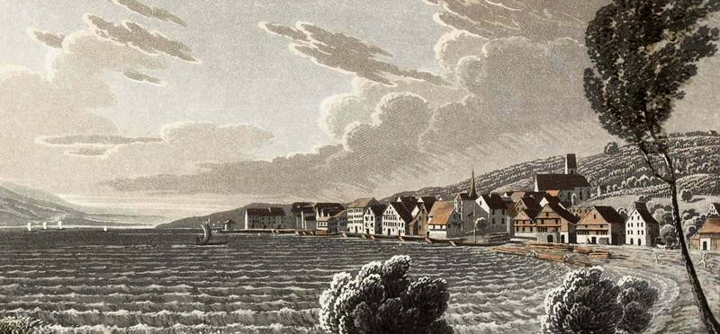 Schmerikon um 1825. Aquatinta